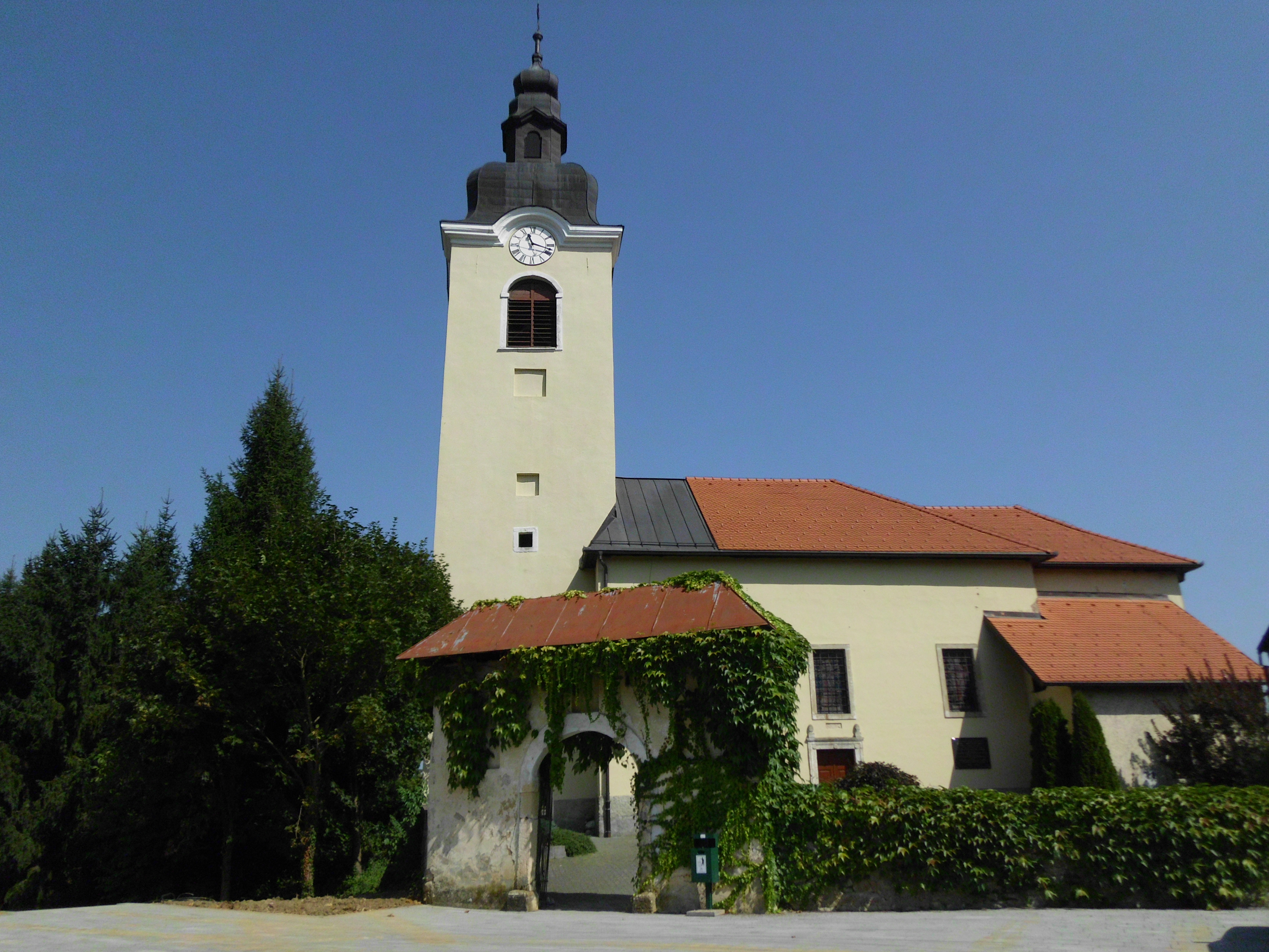 Ozalj - Sv.Vid